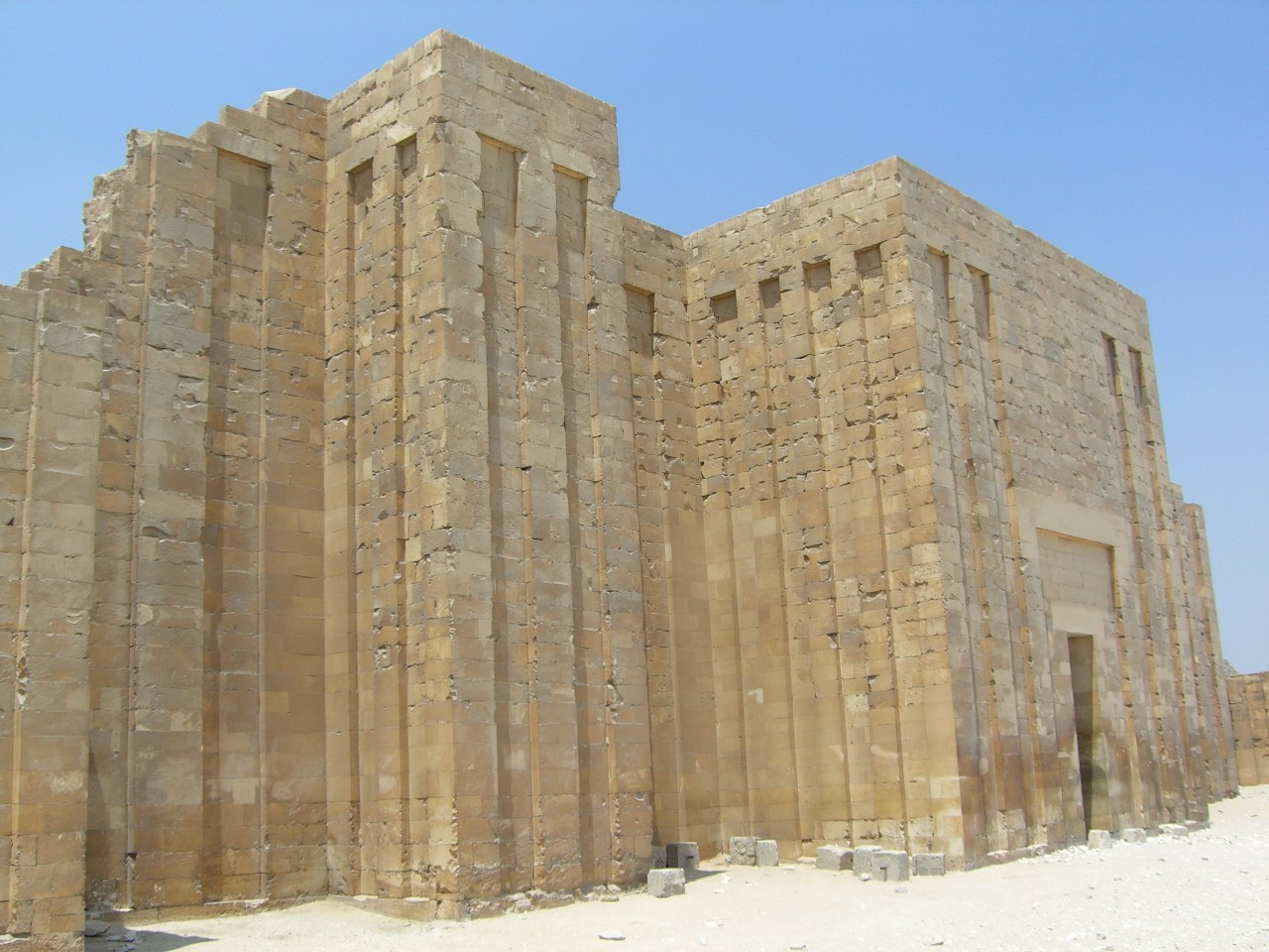 Entrée du complexe funéraire de Djéser au sud-est de l'enceinte - IIIe dynastie égyptienne Appareil: Casio EX-S500